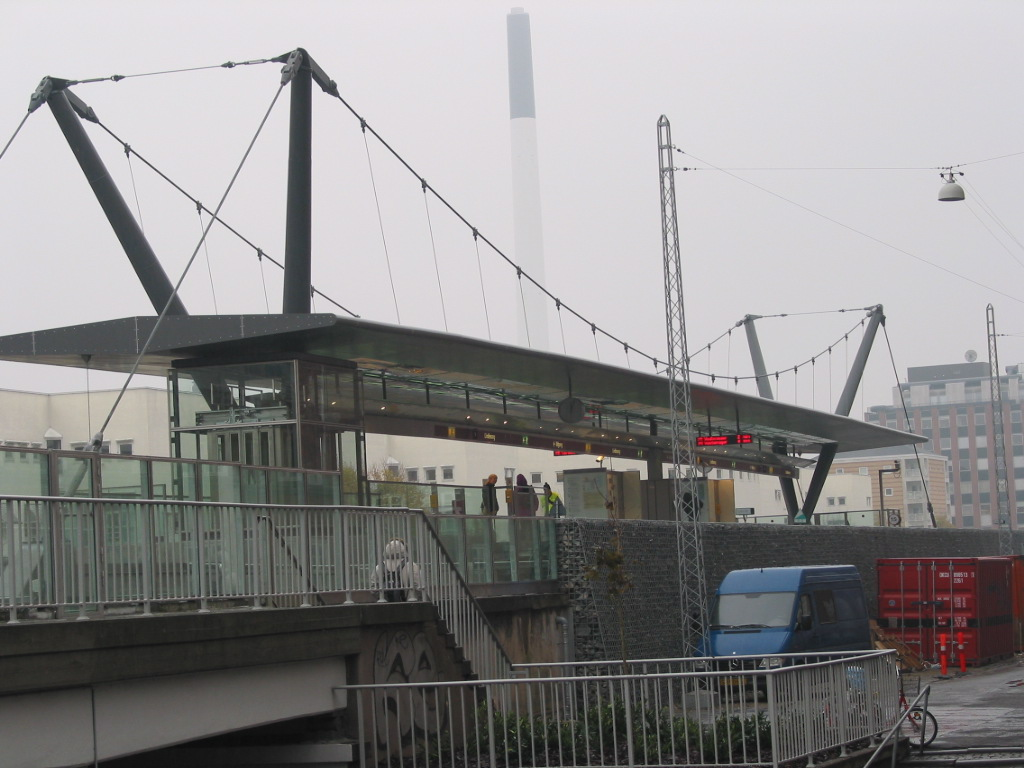 Lindevang Metro Station, Copenhagen